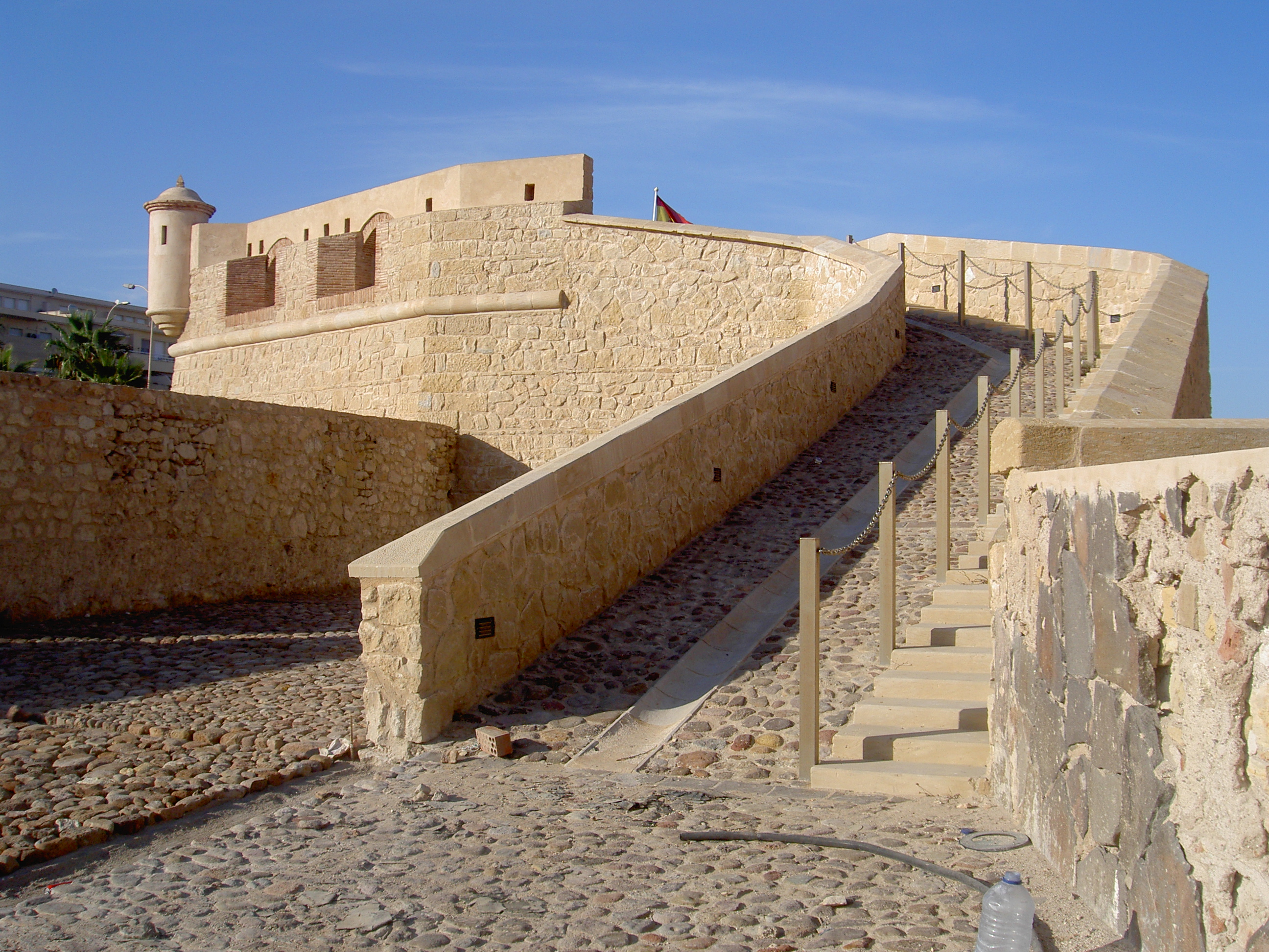 Subida